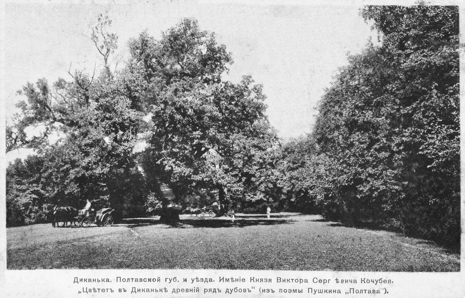 Кочубеївські дуби. Початок 20 ст. Kochubej's Oaks. The beginning of the 20th century. Des chênes des Kotchoubeï. Le début du 20e siècle.